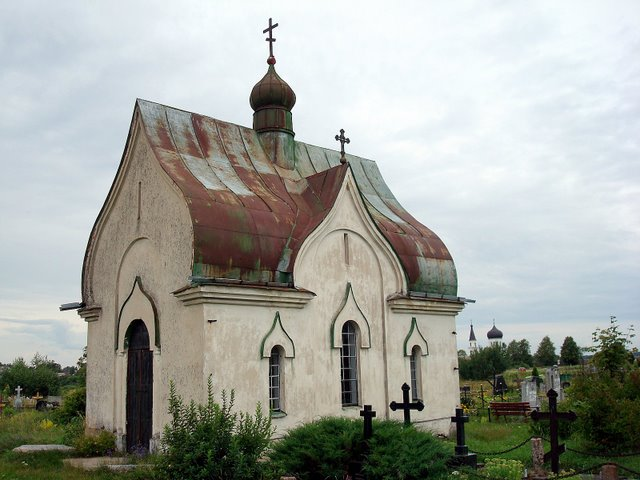 Часовня в Вевисе